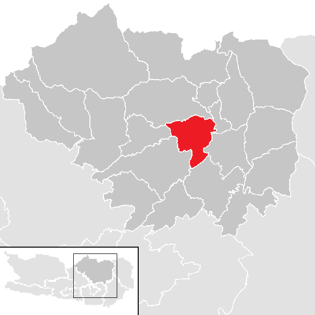 Bezirk Sankt Veit an der Glan